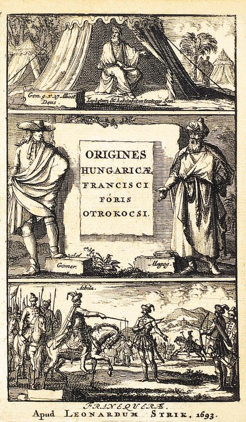 Origines Hungaricae; Sev Liber, Quo Vera nationis Hungaricae Origo & Antiquitas è Veterum Monumentis & Linguis praecipuis, panduntur: Indicatô hunc in finem fonte, tum vulgarium aliquot Vocum Hungaricarum, tum aliorum multorum Nominum, in quibus sunt: Scytha, Hunnus, Hungarus, Magyar, Jász, Athila, Hercules, Ister, Amazon &c. Opus hactenus desideratum … Pars Prima et Secunda. U. ott, 1693.